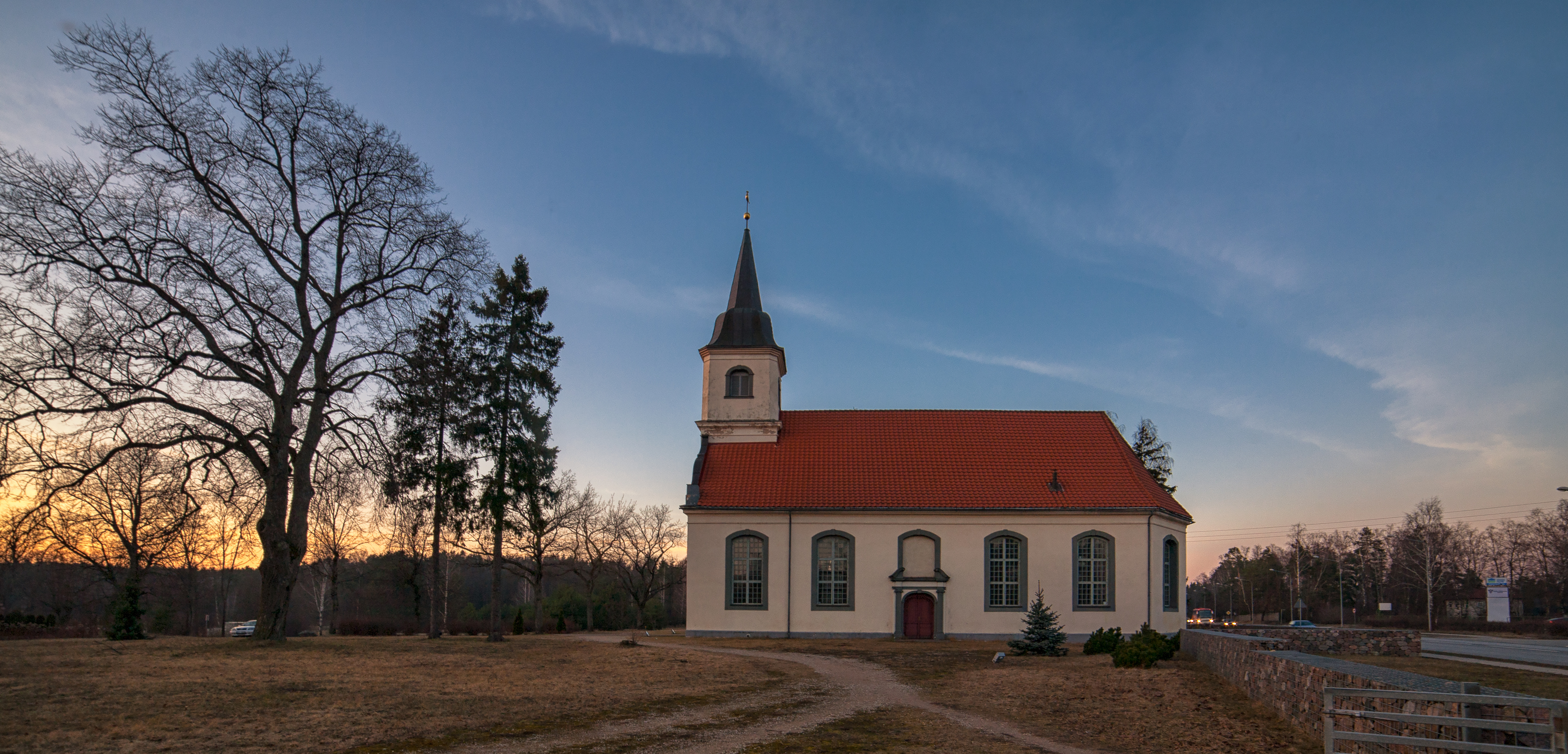 Baltezera (Ādažu) luterāņu baznīca, Baltezers